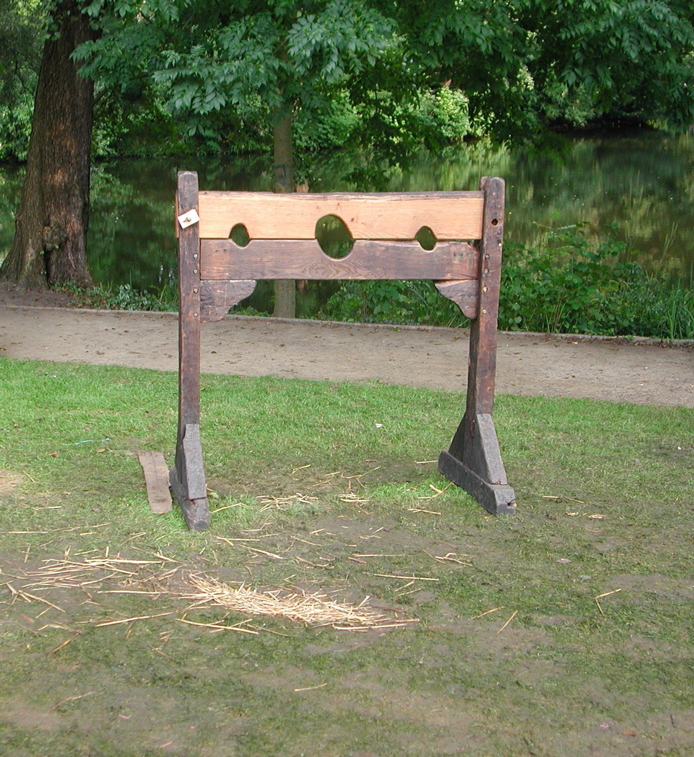 Mittelalterlicher Markt im Schloßpark Bergedorf Pillory